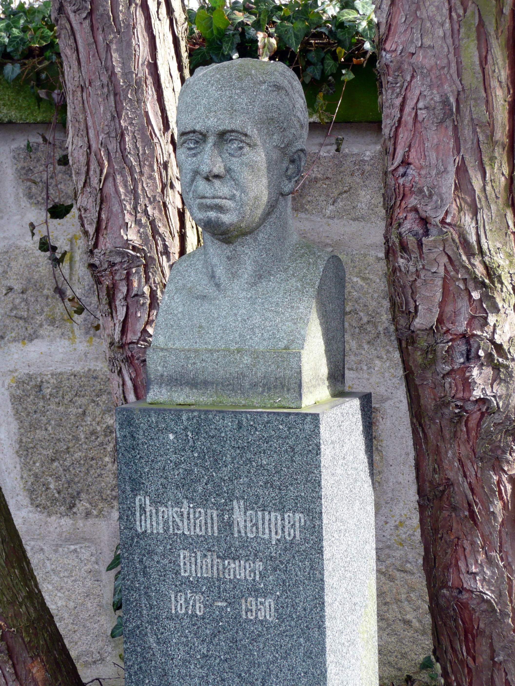 Büste des Bildhauers Christian Neuper (1876-1950) auf dem Friedhof in Weißenstadt (Bayern, Landkreis Wunsiedel)